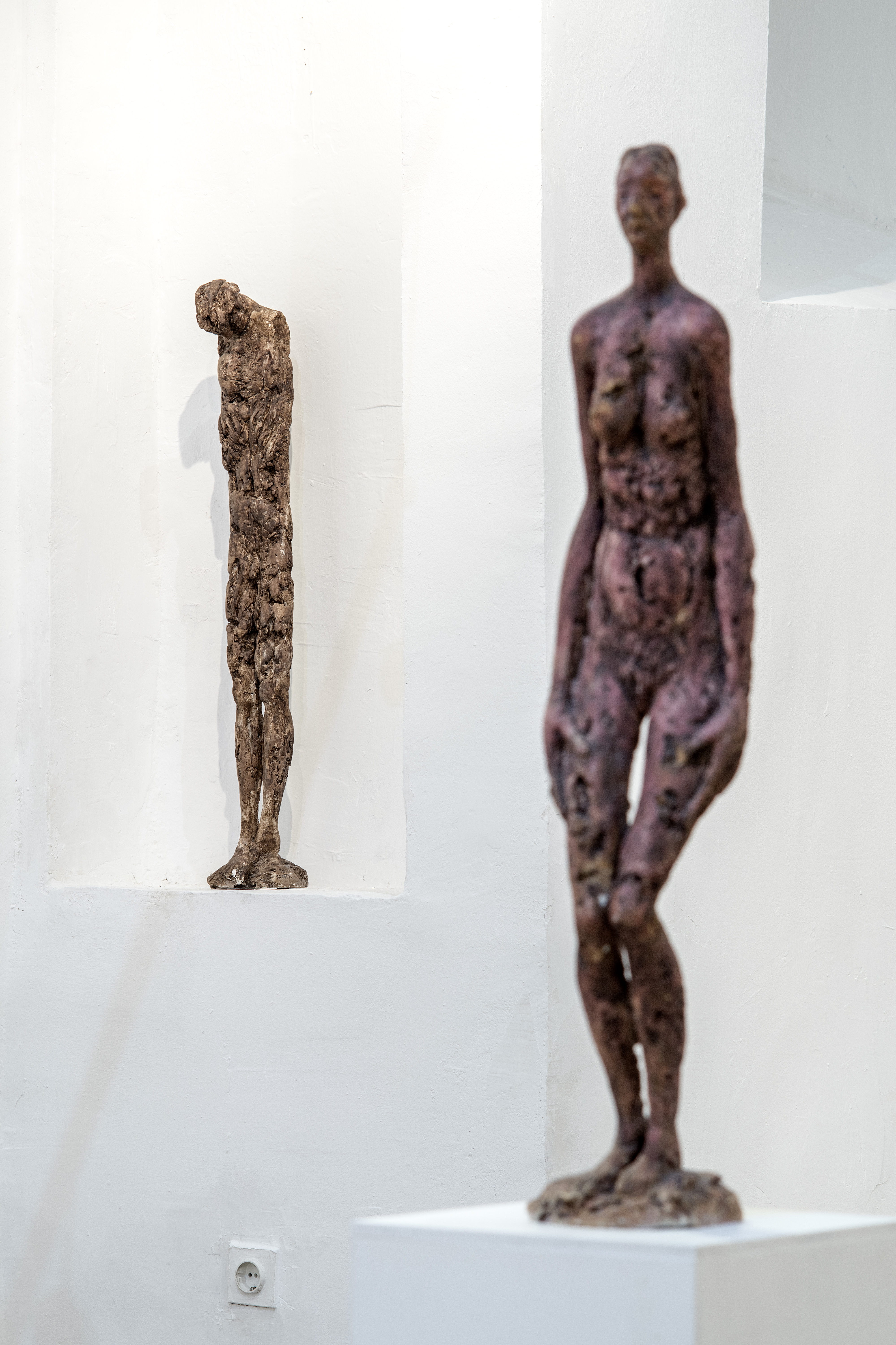 Detalj, izložba u Galeriji svetog Krševana, Šibenik, godina 2019